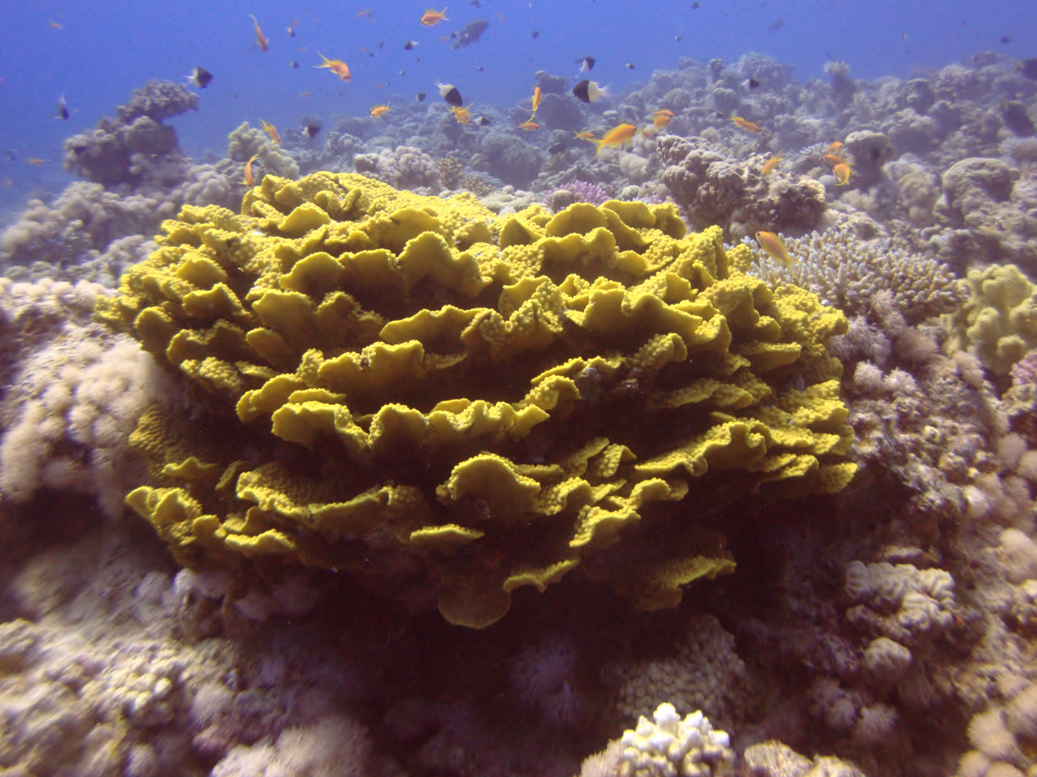 Turbinaria mesenterina en Dhahab, Janub Sina', Egipto, 2013